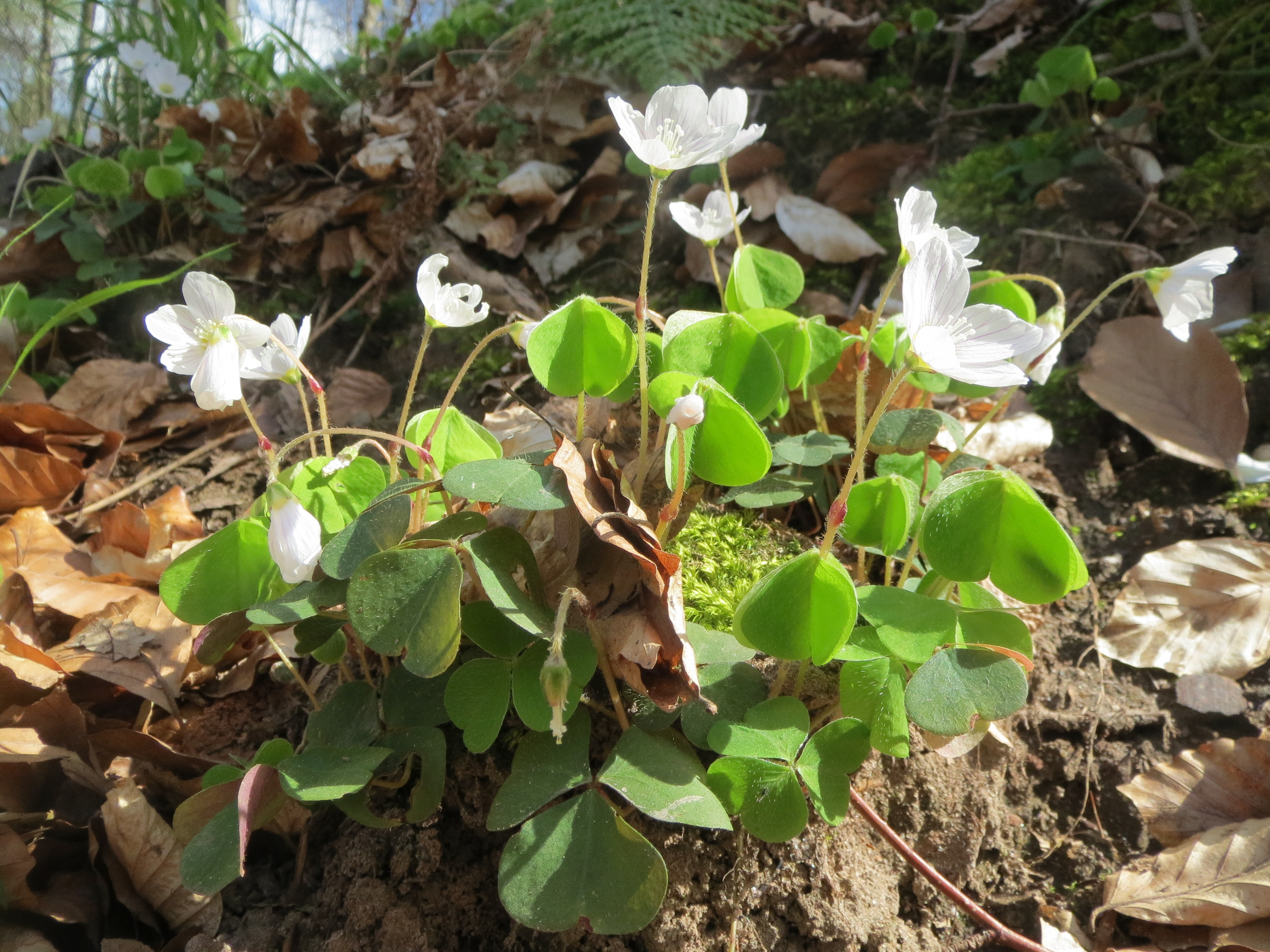 Waldsauerklee (Oxalis acetosella) im Stiftswald Sankt Arnual